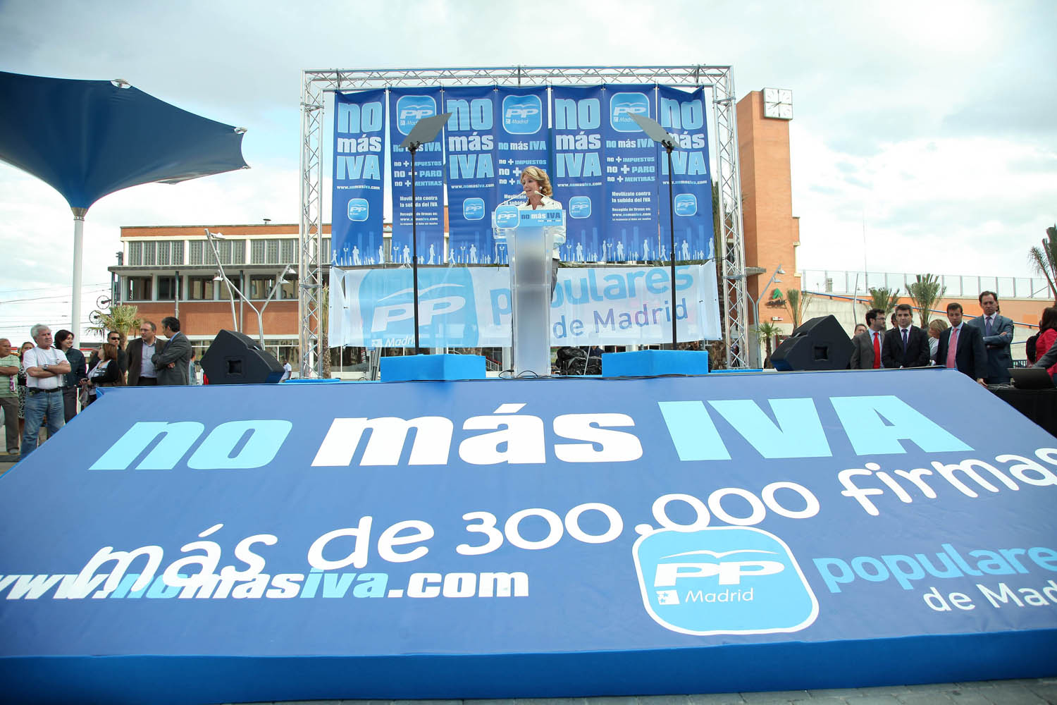 torrejon_01